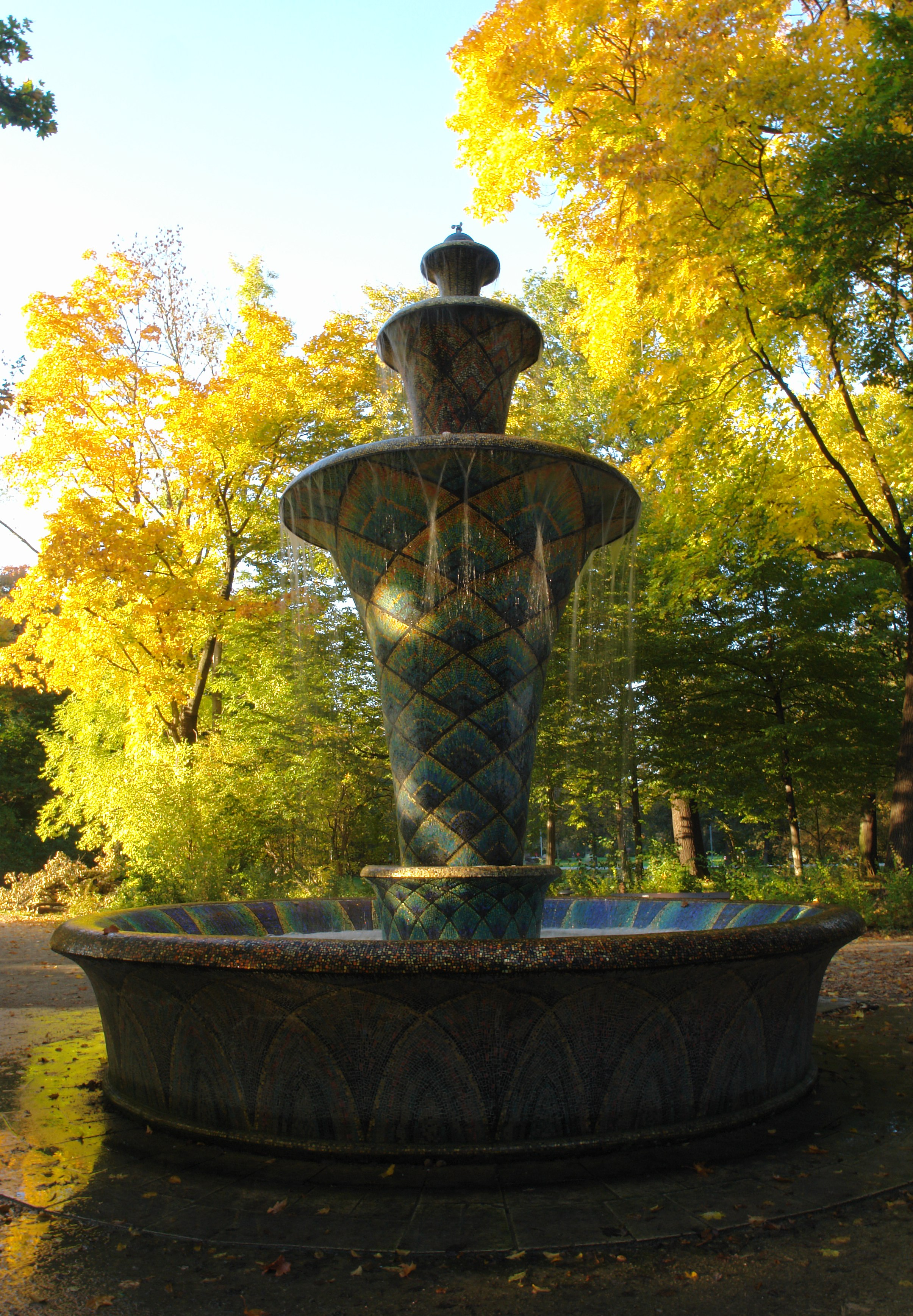 Mosaikbrunnen im Großen Garten